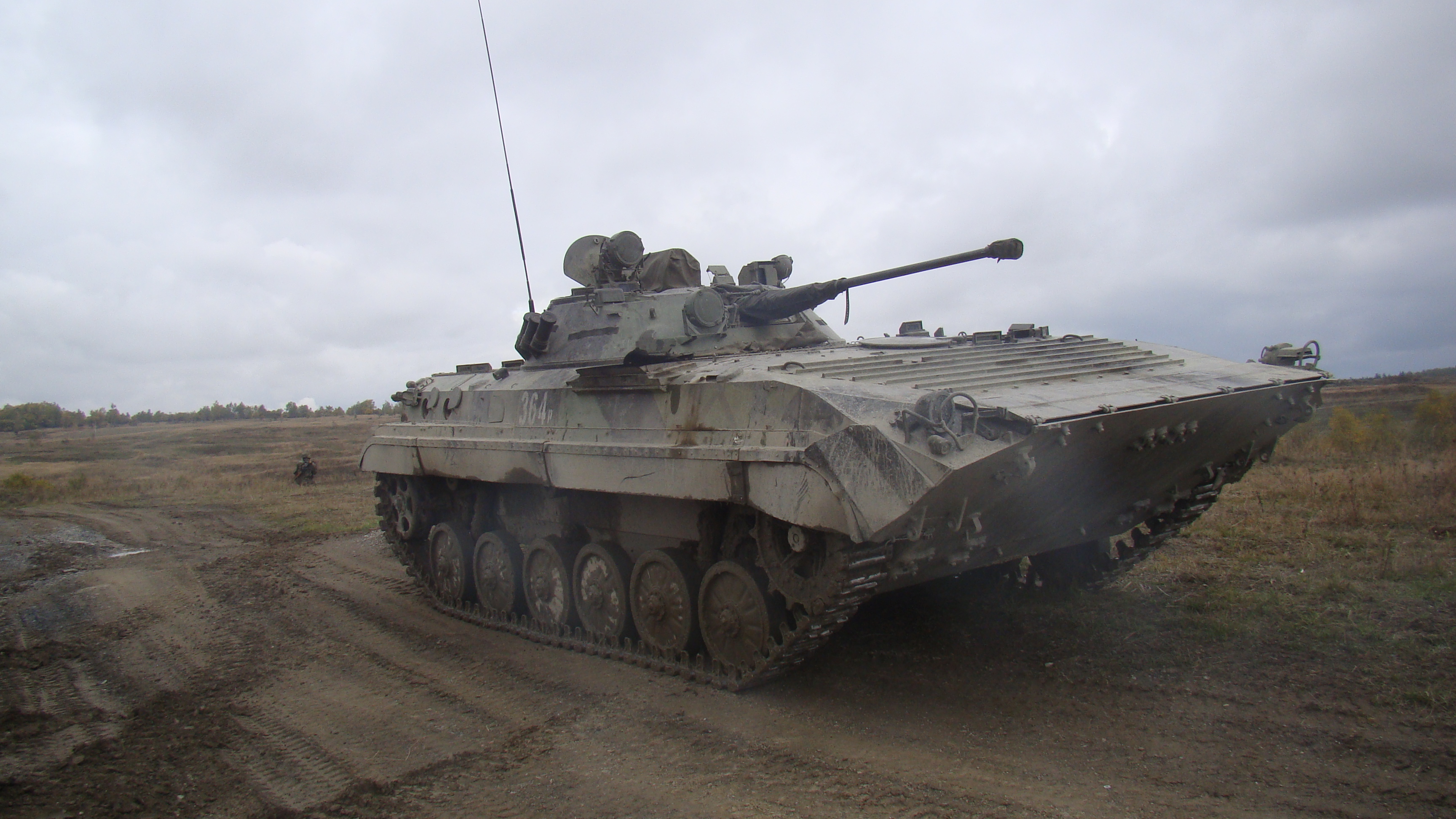 BVP-2 AČR